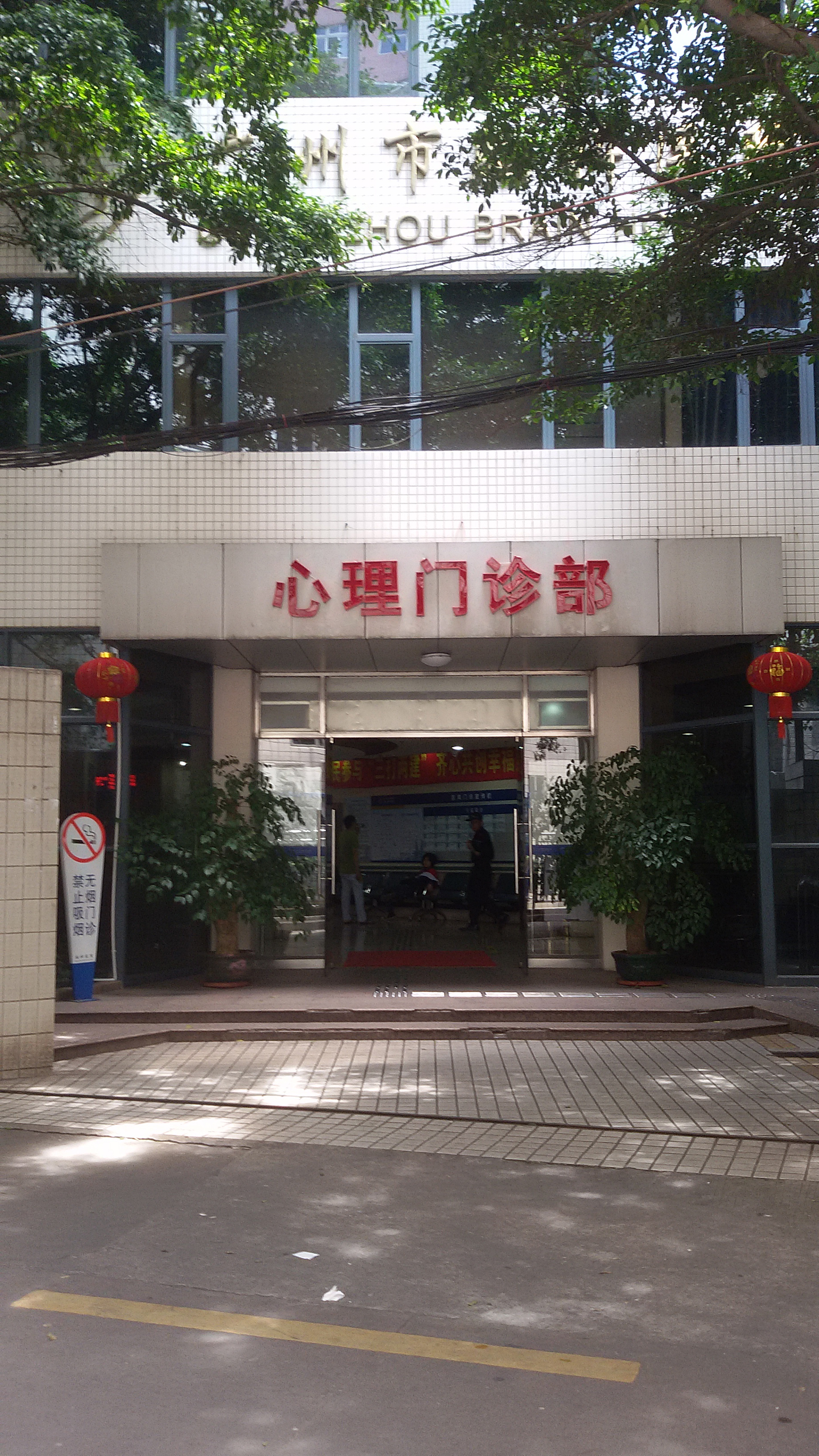 粵語: 广州市脑科医院（周门门诊部）